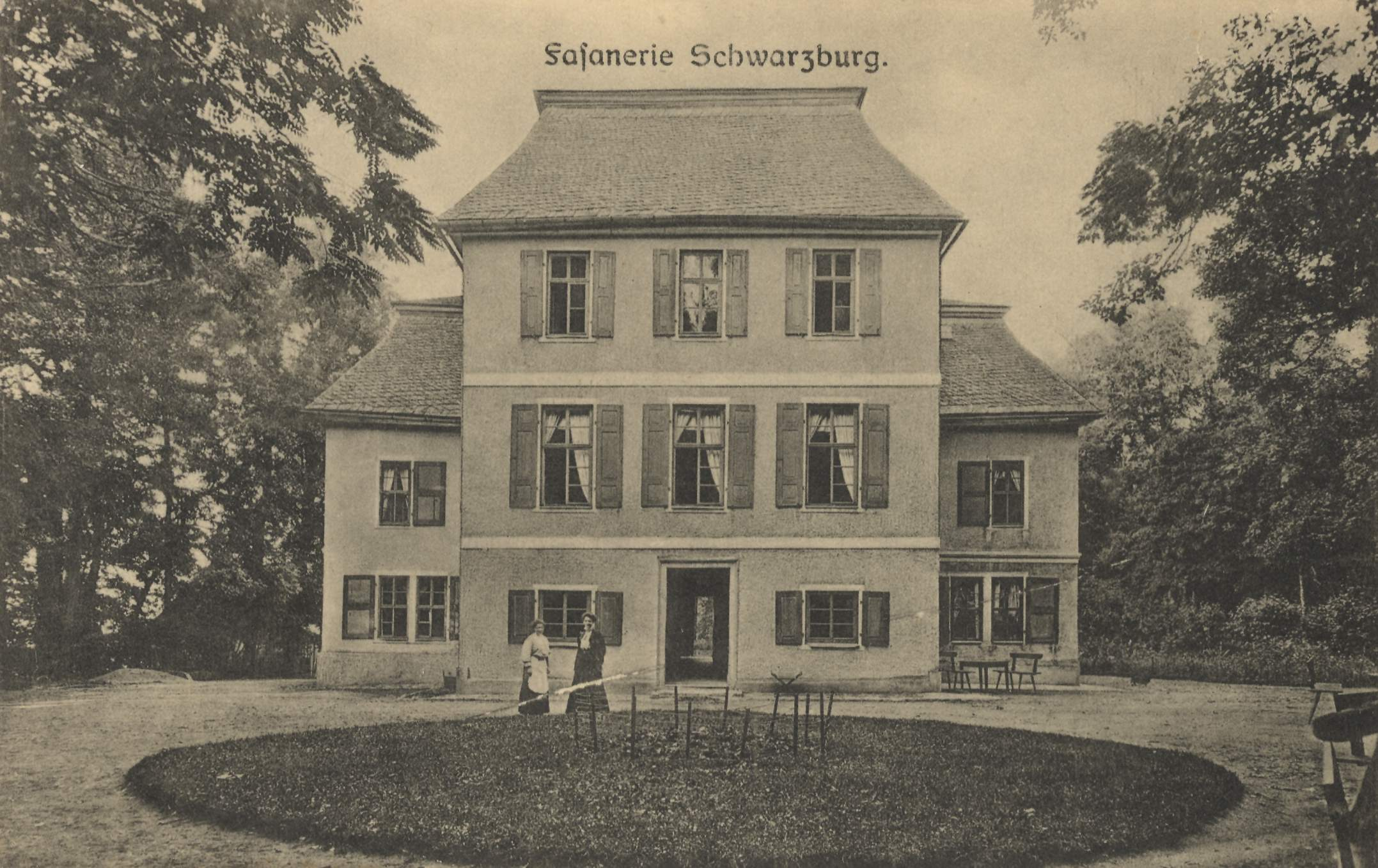 Das Hauptgebäude der Fasanerie nahe dem Schloss Schwarzburg.